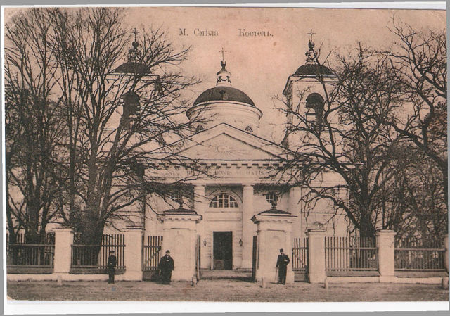 Смілянський костел дореволюційне фото